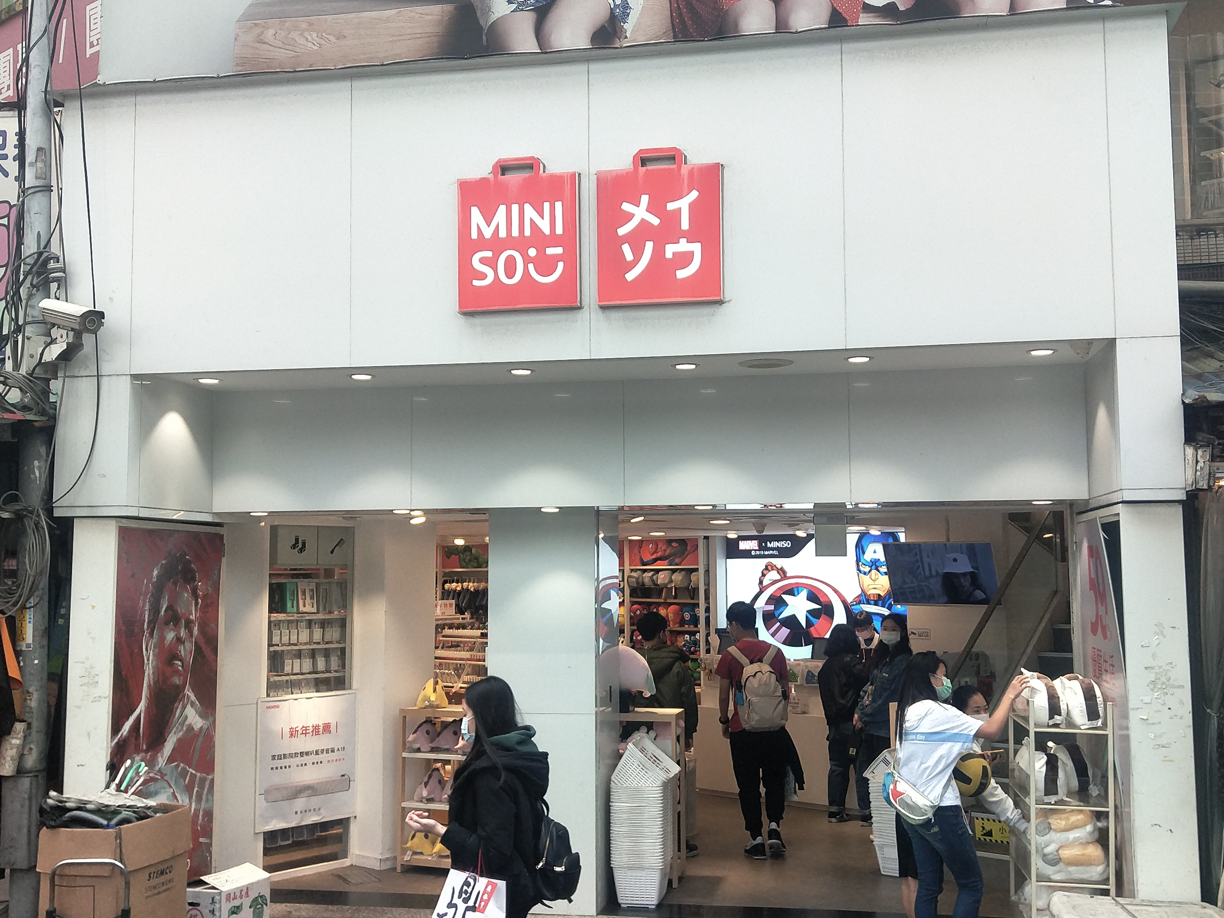 Miniso 新北市板橋新埔店